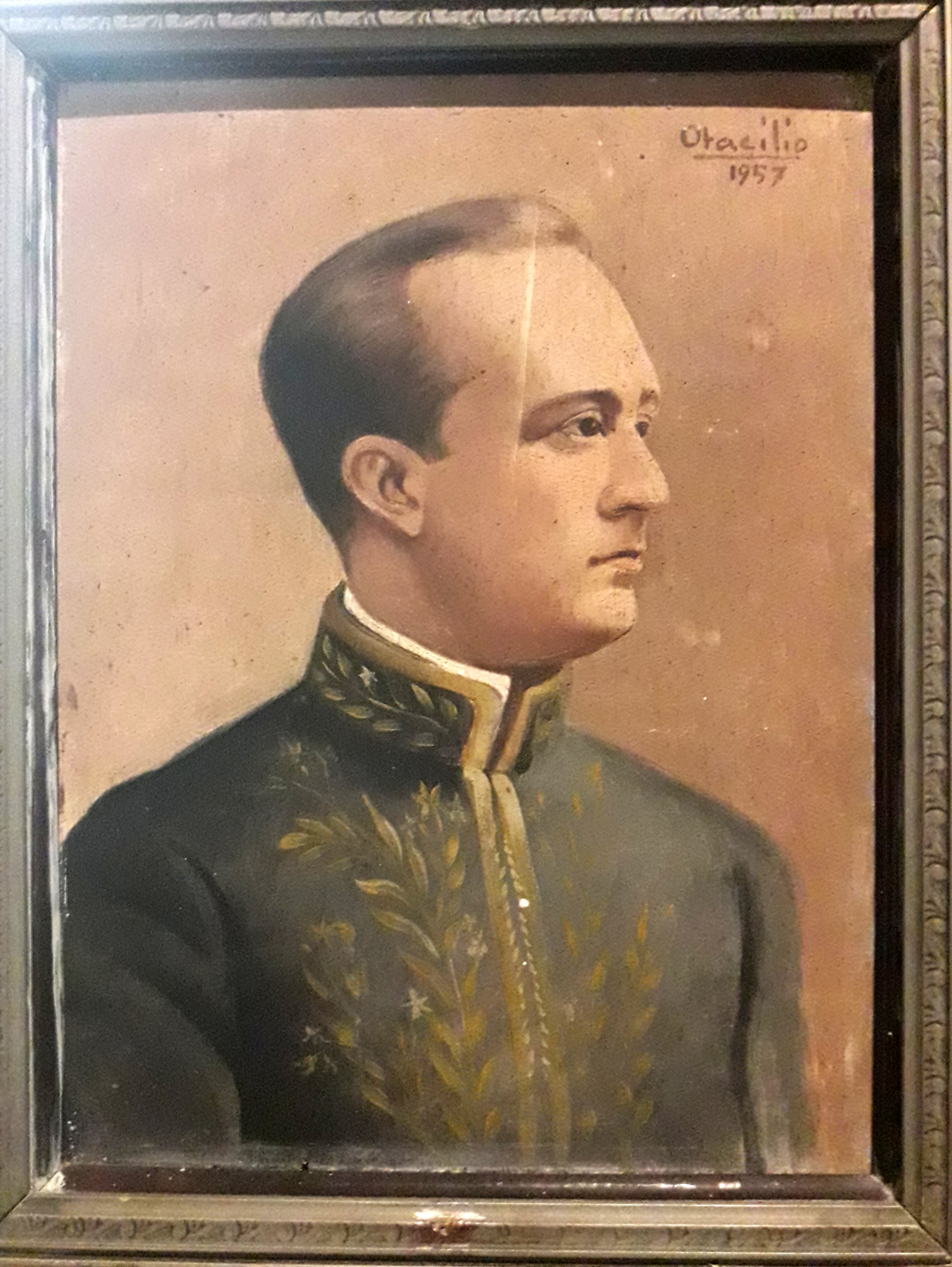 Gustavo Barroso - Tela de Otacílio de Azevedo (1957)